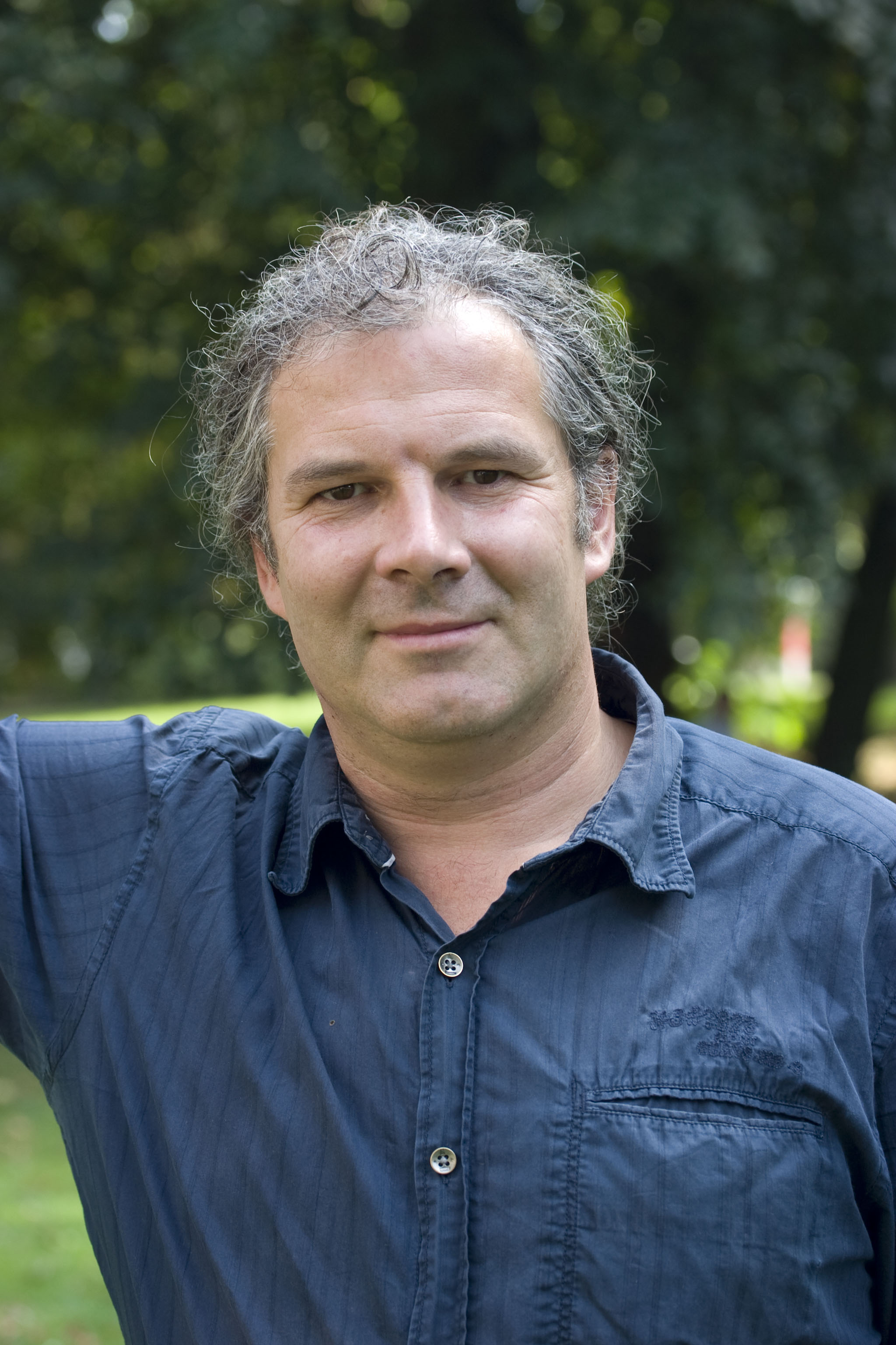 Portrait des deutschen Politikers Andrej Hunko (Partei Die Linke), der im September 2009 in den Bundestag gewählt wurde.